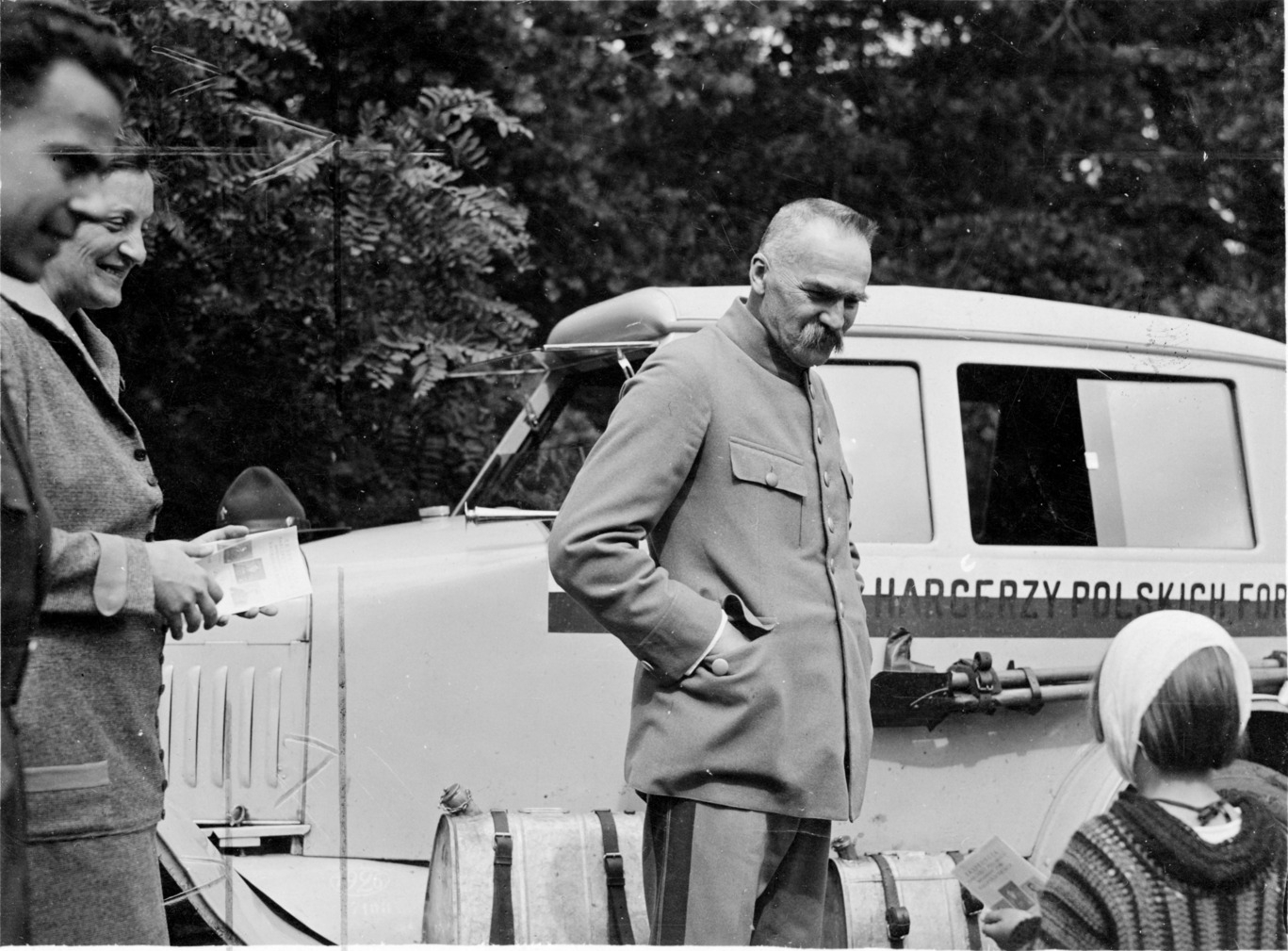 Jerzy Jeliński, Aleksandra Piłsudska, Marszałek Polski Józef Piłsudski z córką Jadwigą w Sulejówku w czasie spotkania podczas wielkiej podróży warszawskiego harcerza Jelińskiego samochodem Ford T (później Buick) dookoła świata. Fot. samochodu na Saharze w Algierii